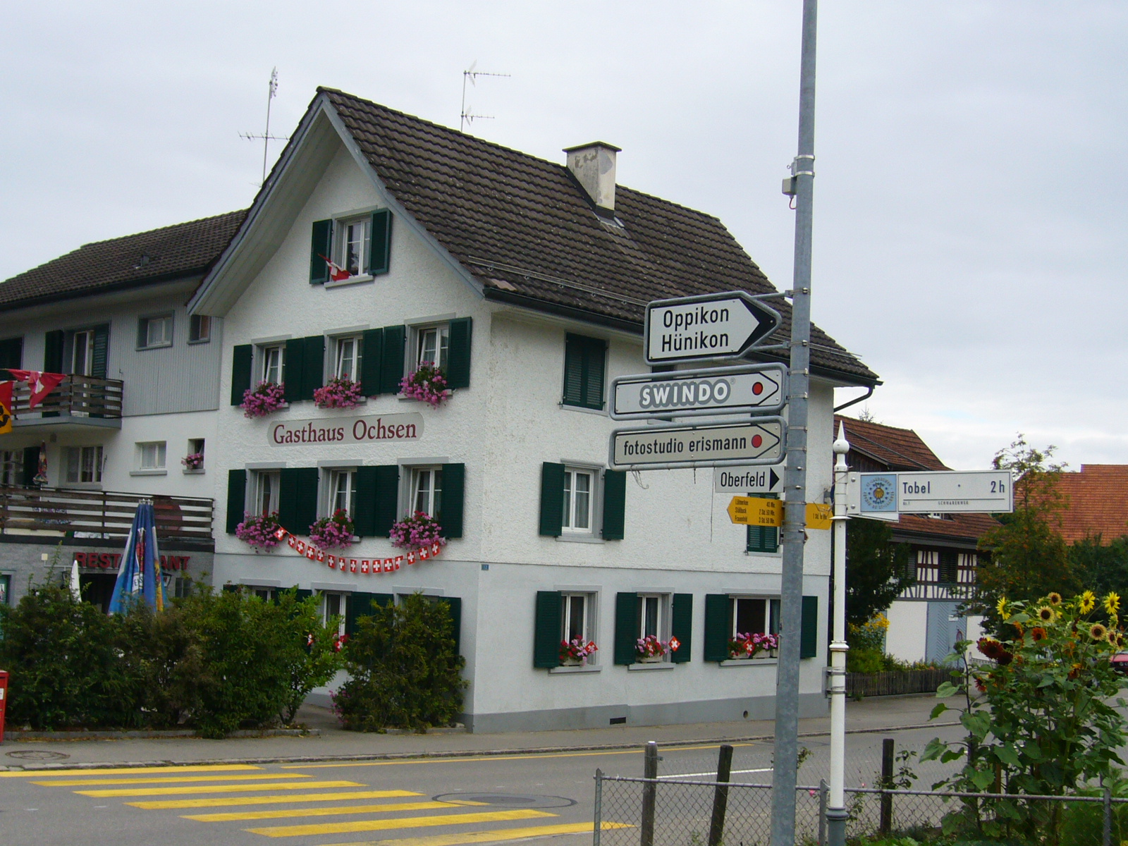 Restaurant Ochsen in Amlikon, canton Thurgau, Switzerland. Picture taken by Peter Berger, August 1, 2006.